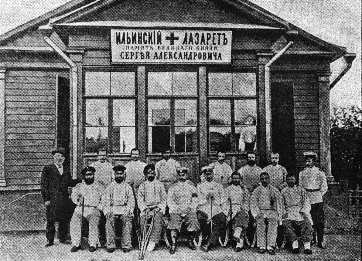 Ильинский лазарет, основанный в 1905 году Великой Княгиней Елизаветой Фёдоровной в память Великого Князя Сергея Александровича. Раненые у лазарета